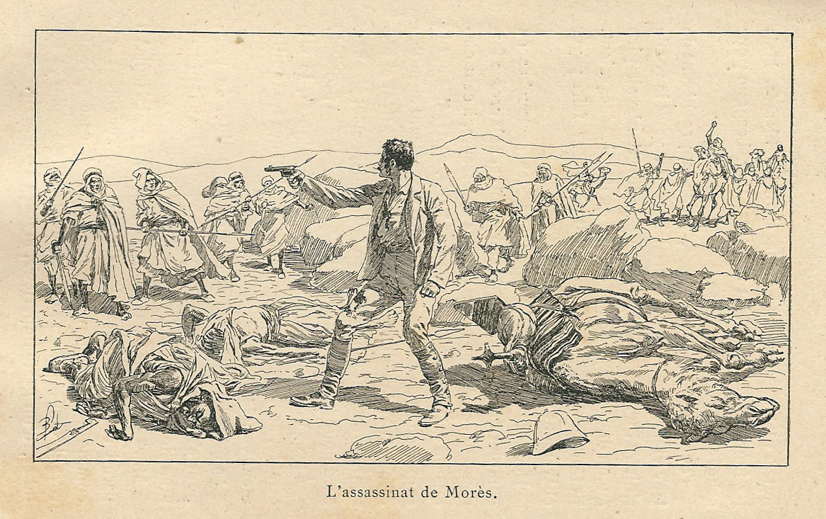 Antoine-Amédée-Marie-Vincent Manca-Amat de Vallombrosa , Marquis de Morès, (1858 - 1896) ; son dernier combat.